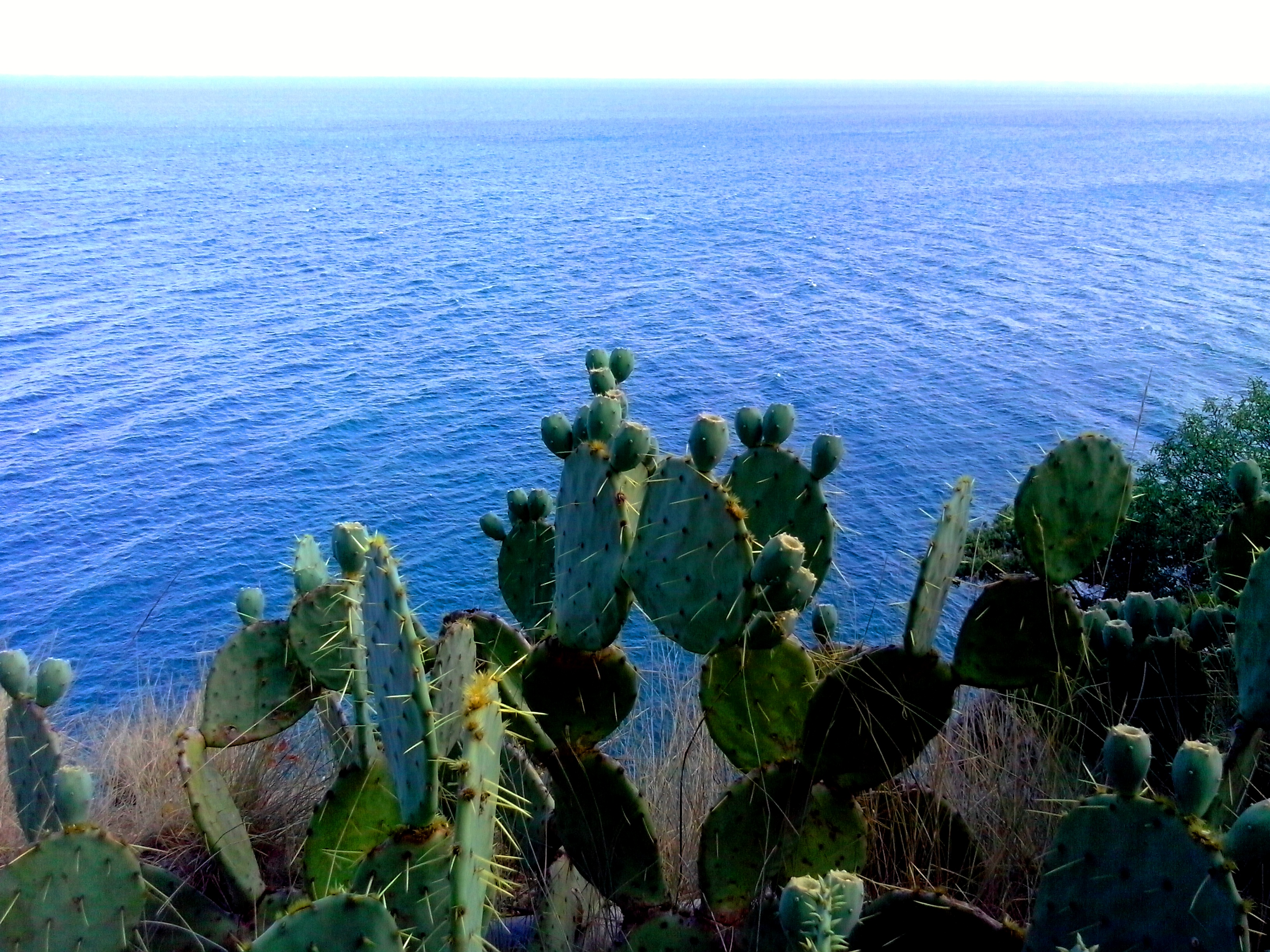 Харакський, 98662 м. Ялта, сел. Гаспра-2